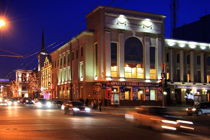 La koncerta halo omaĝe al Jurij Gulajev (filarmonio) (Tjumeno, Rusio)